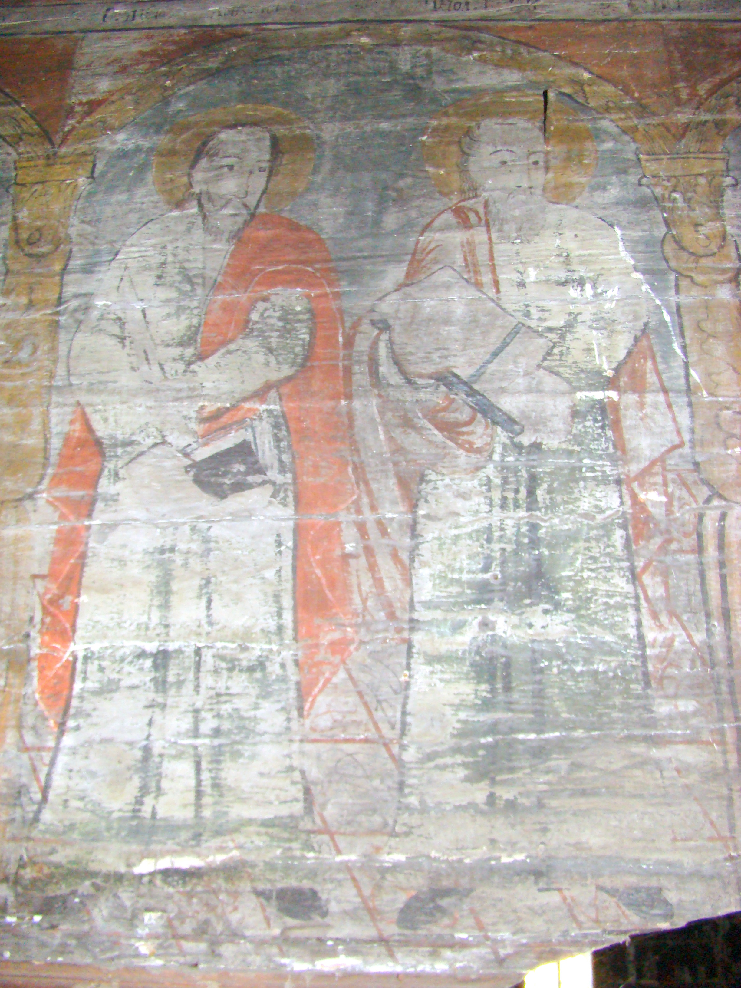 Biserica de lemn din Apahida, județul Cluj